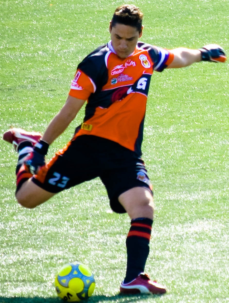 Moisés Muñoz jugando con Monarcas Morelia en 2009.